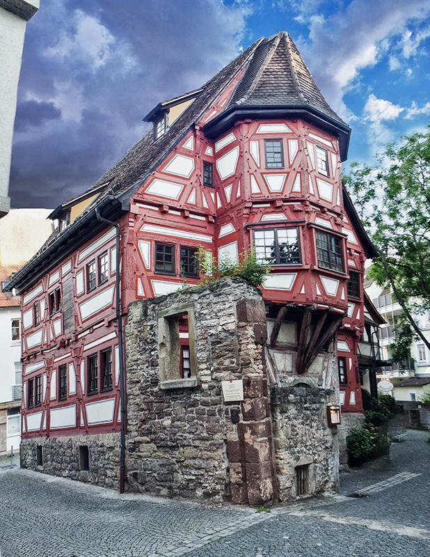 "Klösterle"